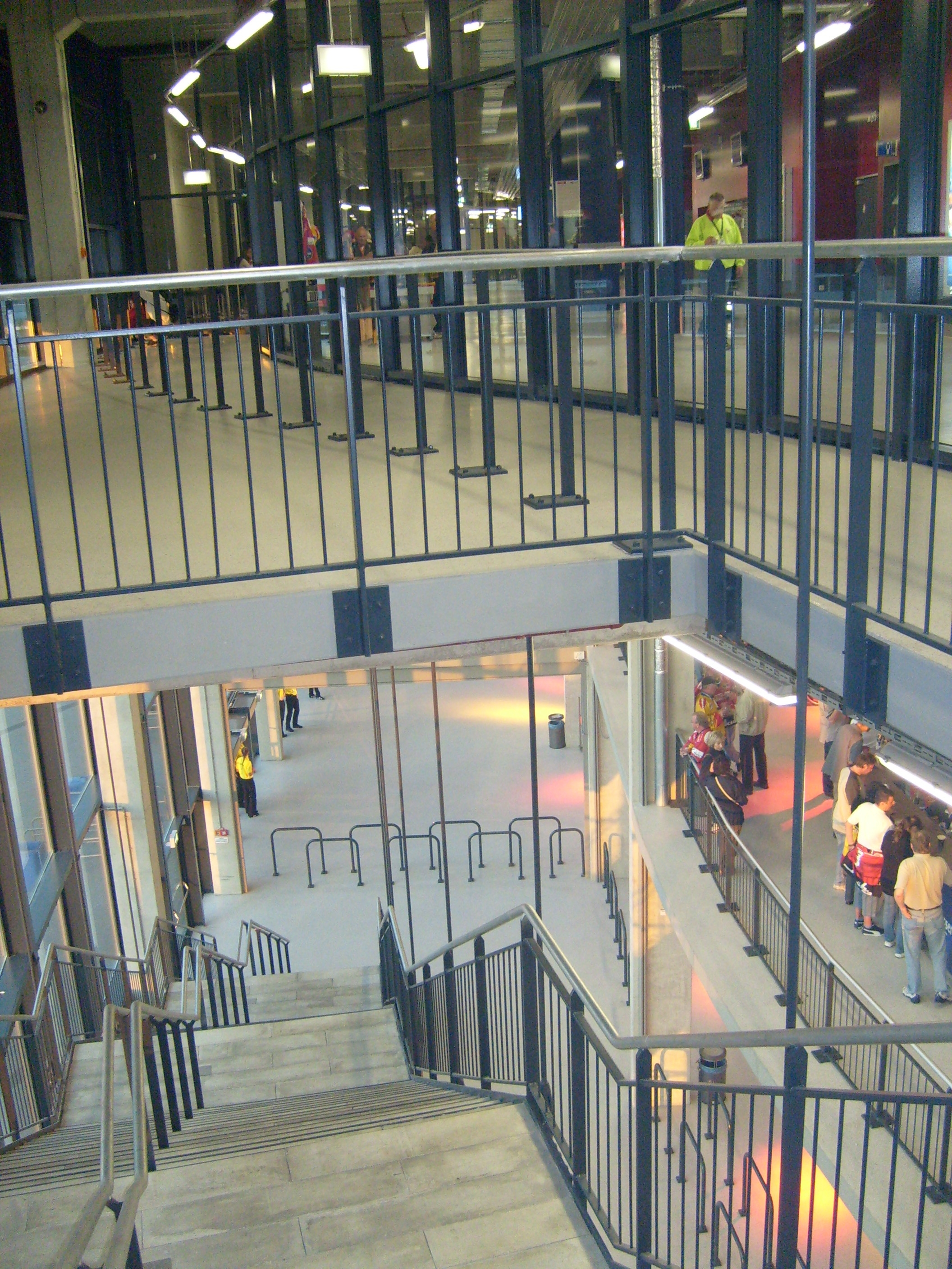 ISS Dome in Düsseldorf-Rath Innenraum